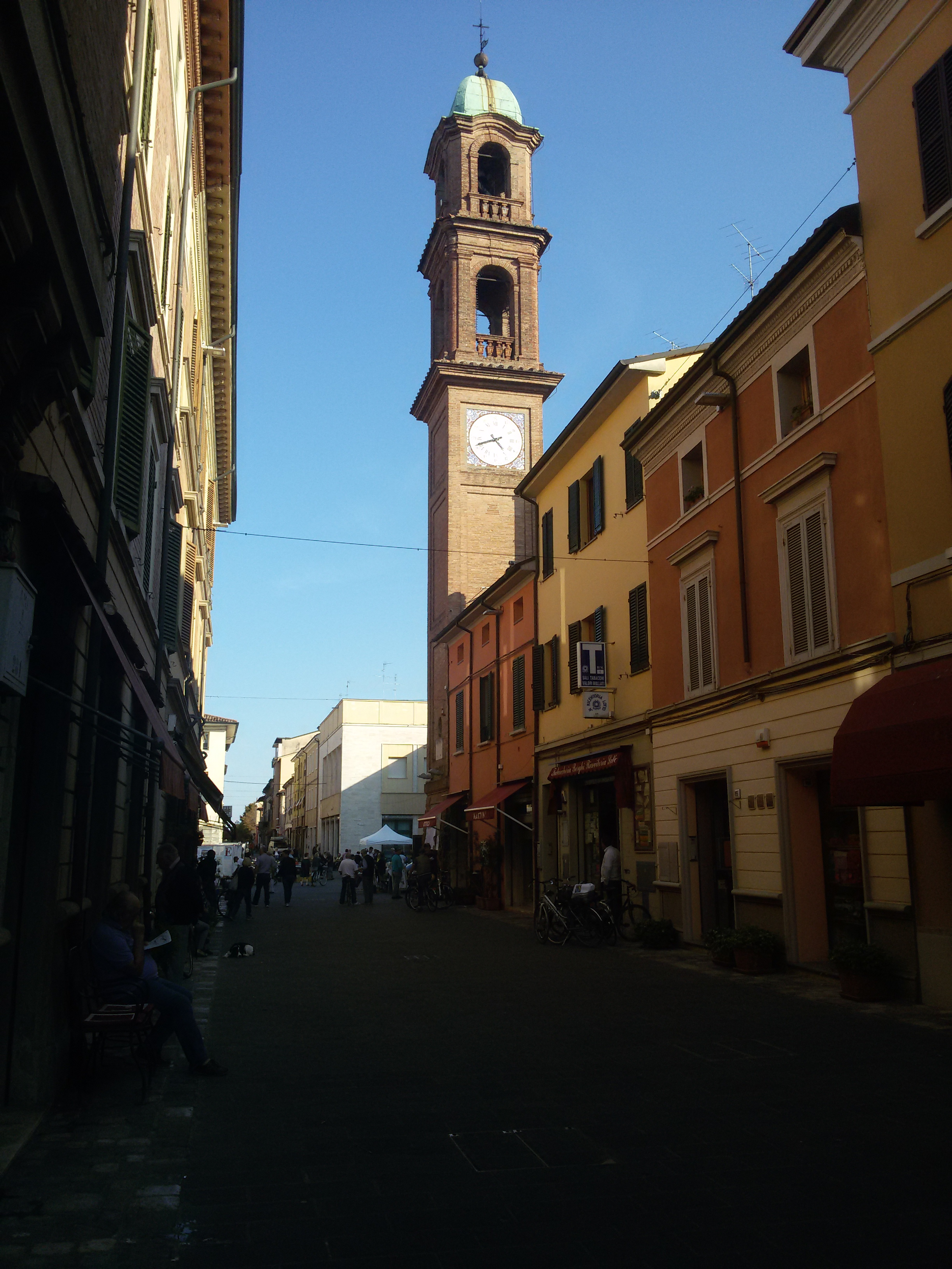 Torre dell'orologio This is a photo of a monument which is part of cultural heritage of Italy.